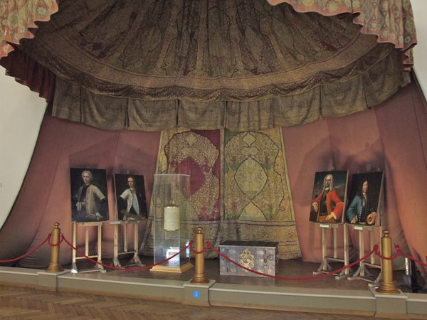 Šator velikog vezira u Muzeju vojne istorije u Beču